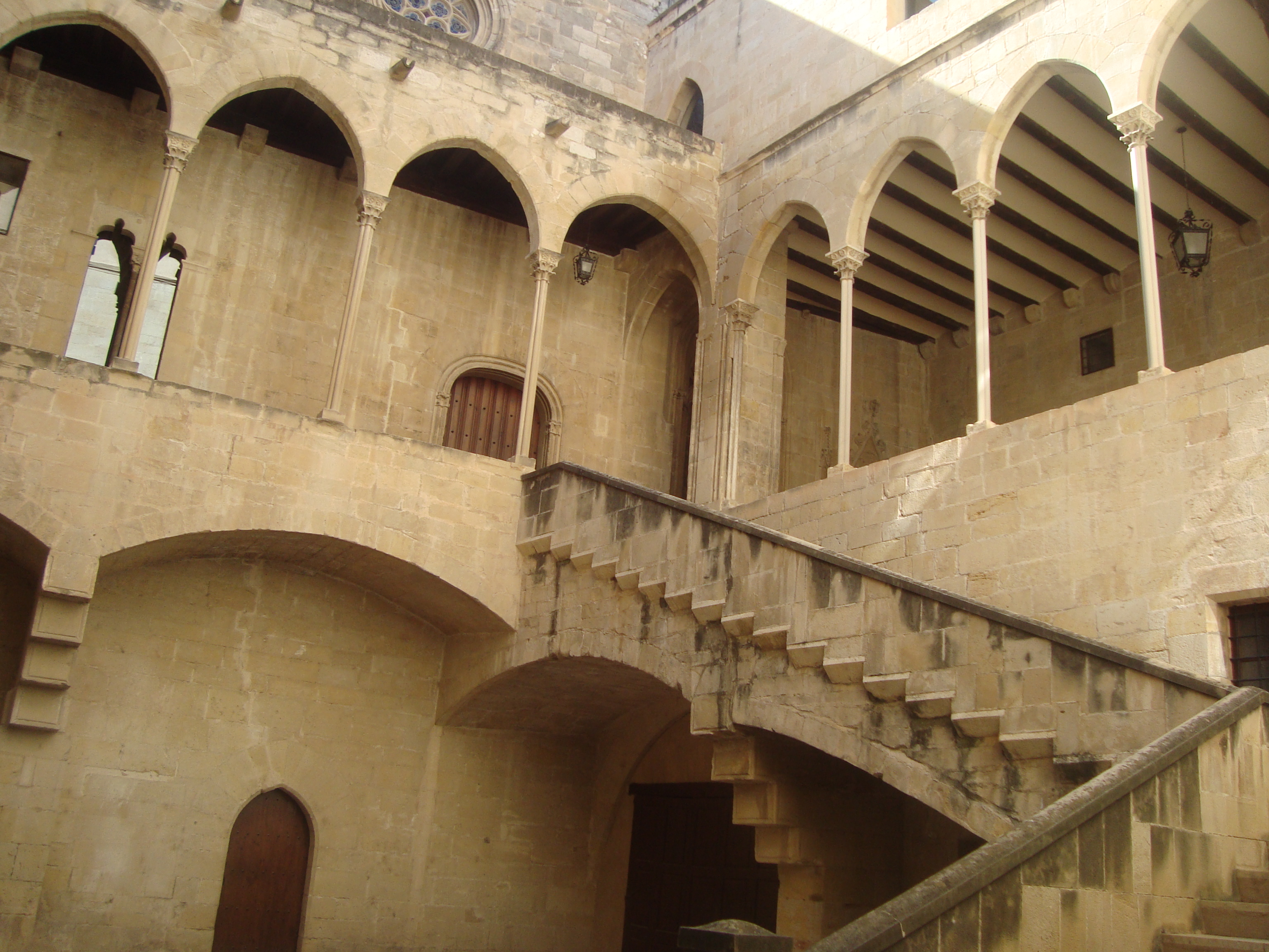 Palau Episcopal (Tortosa)